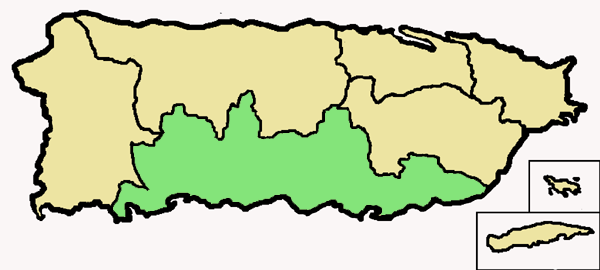 Mappa della diocesi cattolica di Ponce, a Puerto Rico. Anno 2009.